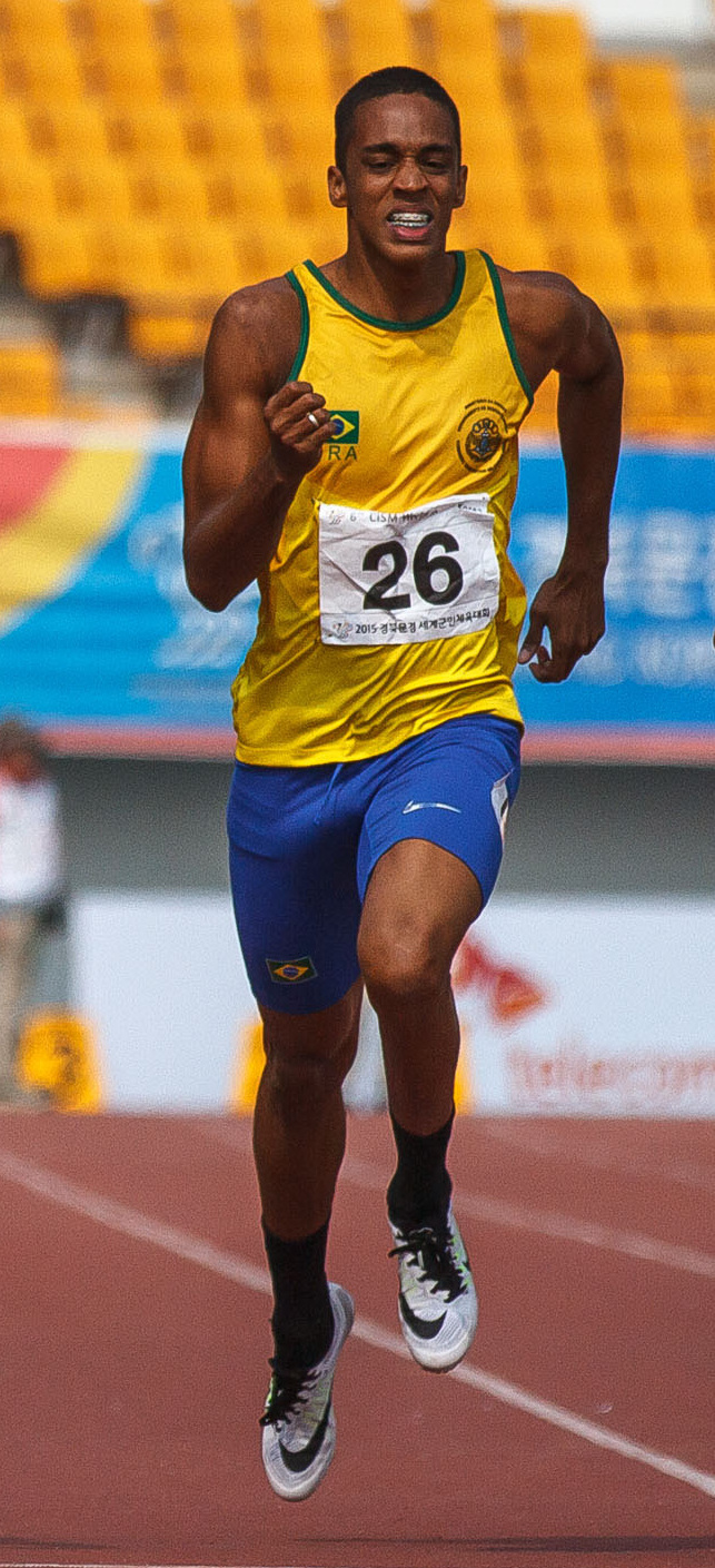 Bronze para Aldemir Gomes da Silva Júnior nos 200m em Mungyeong pelos 6º Jogos Mundiais Militares. Foto: Sgt Johnson Barros